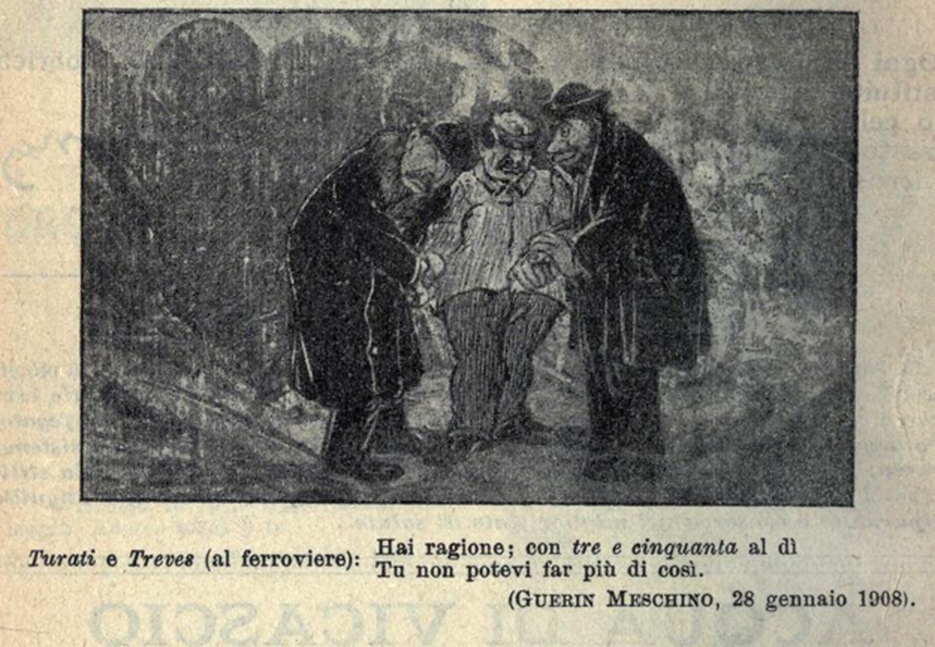 Vignetta satirica di Amero Cagnoni apparsa sul Guerin Meschino del 28 gennaio 1908: Claudio Treves e Filippo Turati rincuorano un ferroviere coinvolto nell'incidente ferroviario dell'Acquabella del 20 gennaio di quell'anno. Licensing Categoria:Incidenti e disastri ferroviari in Italia